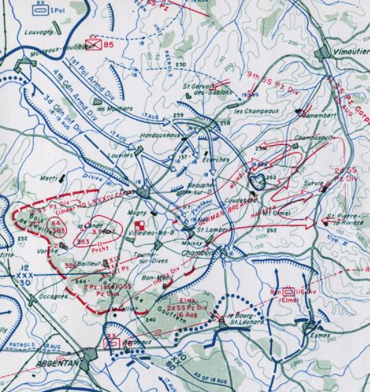 Carte de la fin de la poche de Falaise